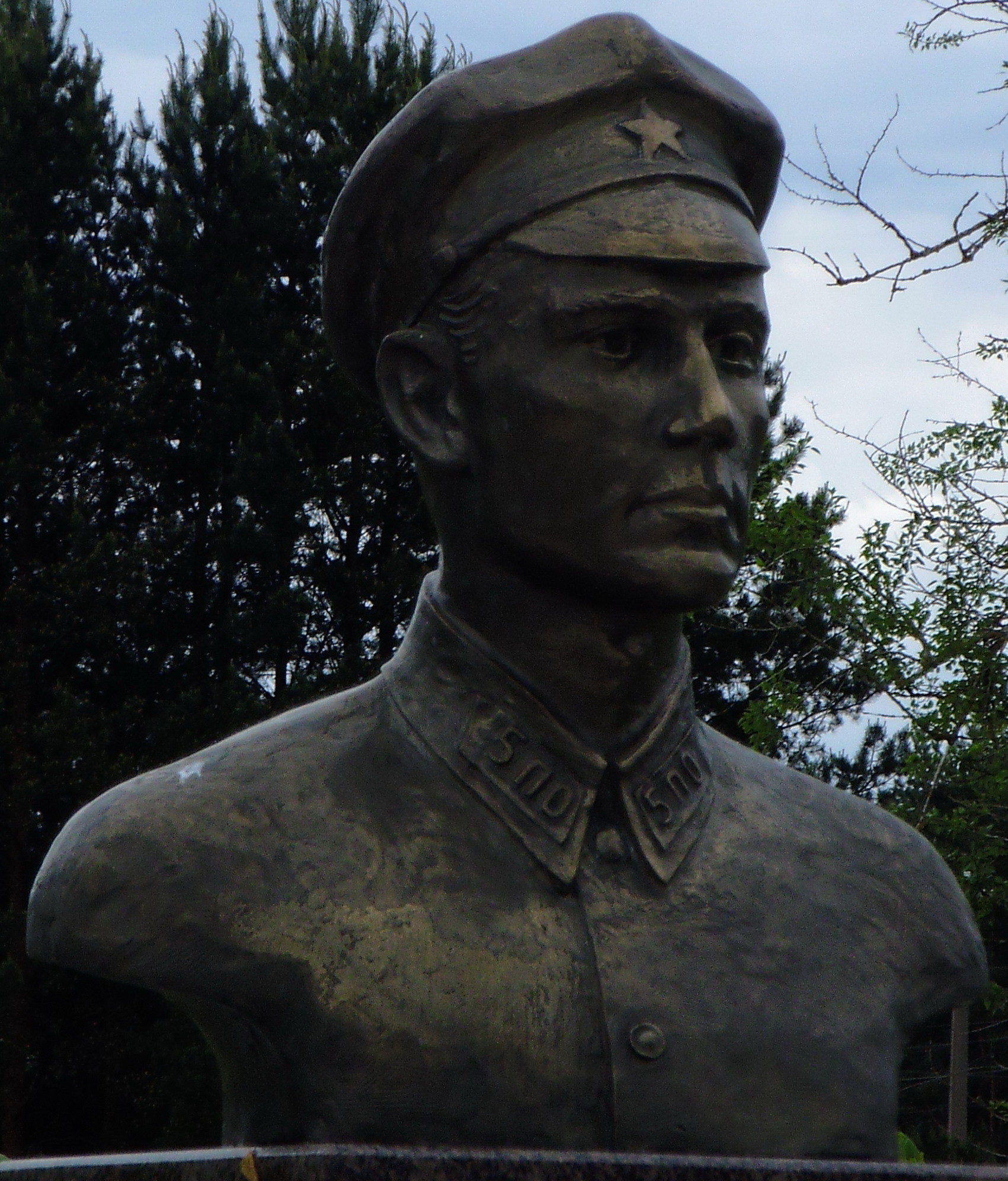 Сестрорецк СПб. Бюст пограничнику Коробицину в сквере пограничников